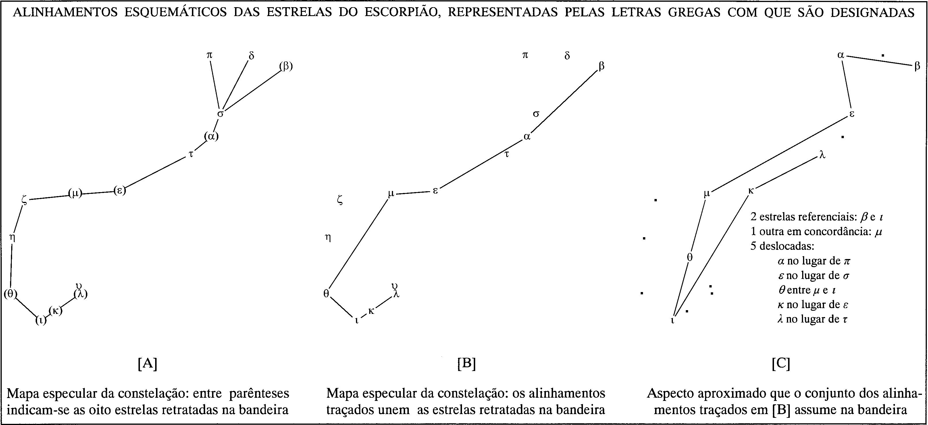 Trata-se de três esquemas colocados em escala e orientação perfeitamente concordantes. À esquerda (A) vê-se um mapa especular parcial do Escorpião, imagem invertida da que se pode encontrar em qualquer enciclopédia ou carta celeste. Fica o norte para a direita e o leste para baixo. No mapa do meio (B) traçam-se linhas unindo apenas as oito estrelas que, segundo a legislação, estão representadas na bandeira do Brasil. Designadas por letras gregas, são elas, em ordem alfabética: α, β, ε, θ, ι, κ, λ e μ.* Tais interligações são então transpostas ao esquema da direita (C), em que os oito astros dispõem-se de modo semelhante ao que na bandeira se vê desenhado — daí resultando dois conjuntos de alinhamentos tremendamente díspares. Tomando como referência as duas estrelas que, tanto no mapa quanto no desenho, acham-se mais afastadas, é possível estabelecer correspondências aproximadas entre as posições dos demais astros em ambos os esquemas (C em relação a B) — algo particularmente útil àqueles que, familiarizados com as constelações a ponto de conseguir vislumbrá-las mentalmente sob uma perspectiva exterior à esfera celeste, queiram visualizar no céu o Escorpião tal como figura (ou desfigura-se) na bandeira. Outra tríplice imagem que agreguei à Wikimedia Commons, "Scorpius_Bandeira_Brasil_ Prado.gif", faz exatamente a mesma abordagem, mas de acordo com a hipótese expressa no livro A Bandeira Nacional, de Eduardo Prado (São Paulo, Escola Typographica Salesiana, 1903). Numa época em que a legislação ainda não se pronunciara a respeito, o autor supõe serem estas, em ordem alfabética, as estrelas do Escorpião retratadas na bandeira: α, β, δ, ε, κ, λ, μ e τ.** Comparando os dois arquivos percebe-se que, embora consideráveis, as distorções que Eduardo Prado pretendeu demonstrar são muito menores do que as que hoje se encontram avalizadas por lei. (*) (**)